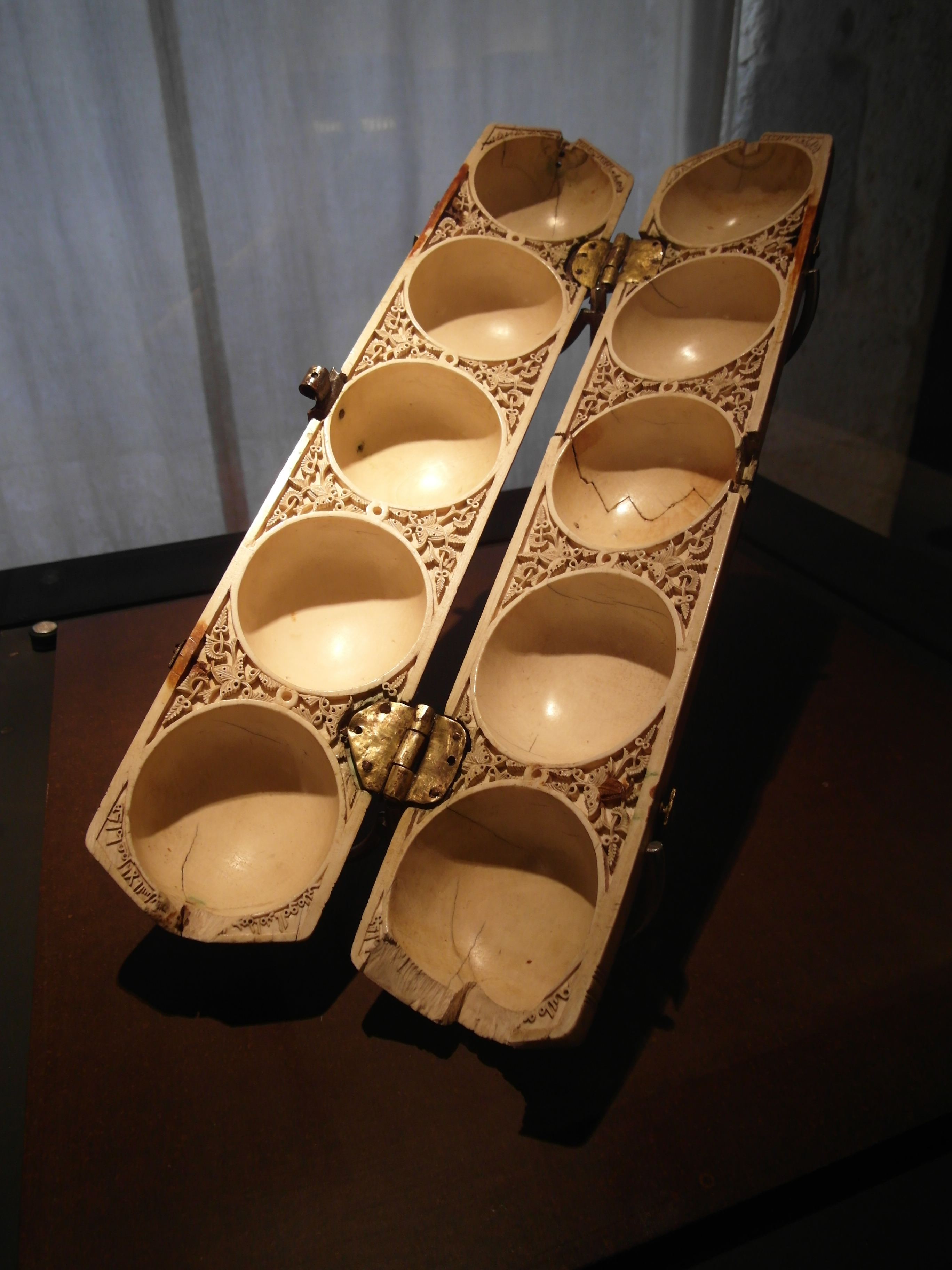 Estiche de marfil de un taller de Media Azahara, principios del siglo X, del monaterio de Santo Domingo de Silos. Museo de Burgos.